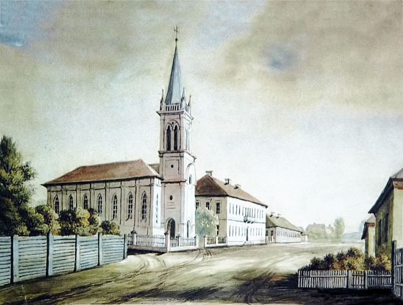 Беларуская (тарашкевіца): Слуцак (Słucak), вуліца Сэнатарская (vulica Senatarskaja). Кальвінскі збор і гімназія.